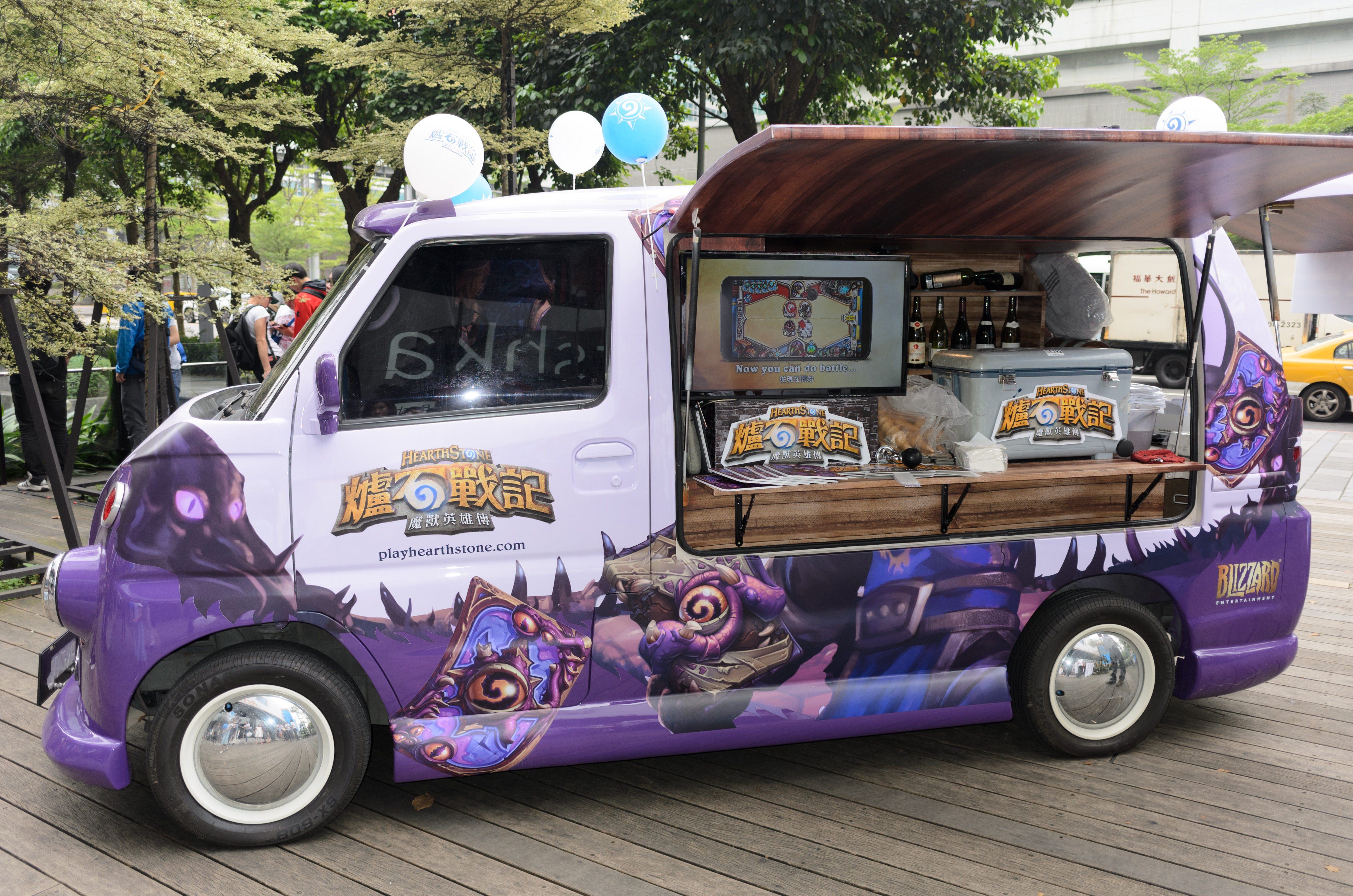 ＜爐石戰記＞街頭競技場演出歡樂氣氛的主要道具爐石卡車（工作人員稱呼），使用改裝成VW T1風的中華汽車Veryca廂型車。本次活動的會場布置與活動規則基本上與今年4月16日同地舉辦的上回街頭競技場相同，最大的差別就是爐石卡車外裝換成古神碎碎念卡牌式樣。